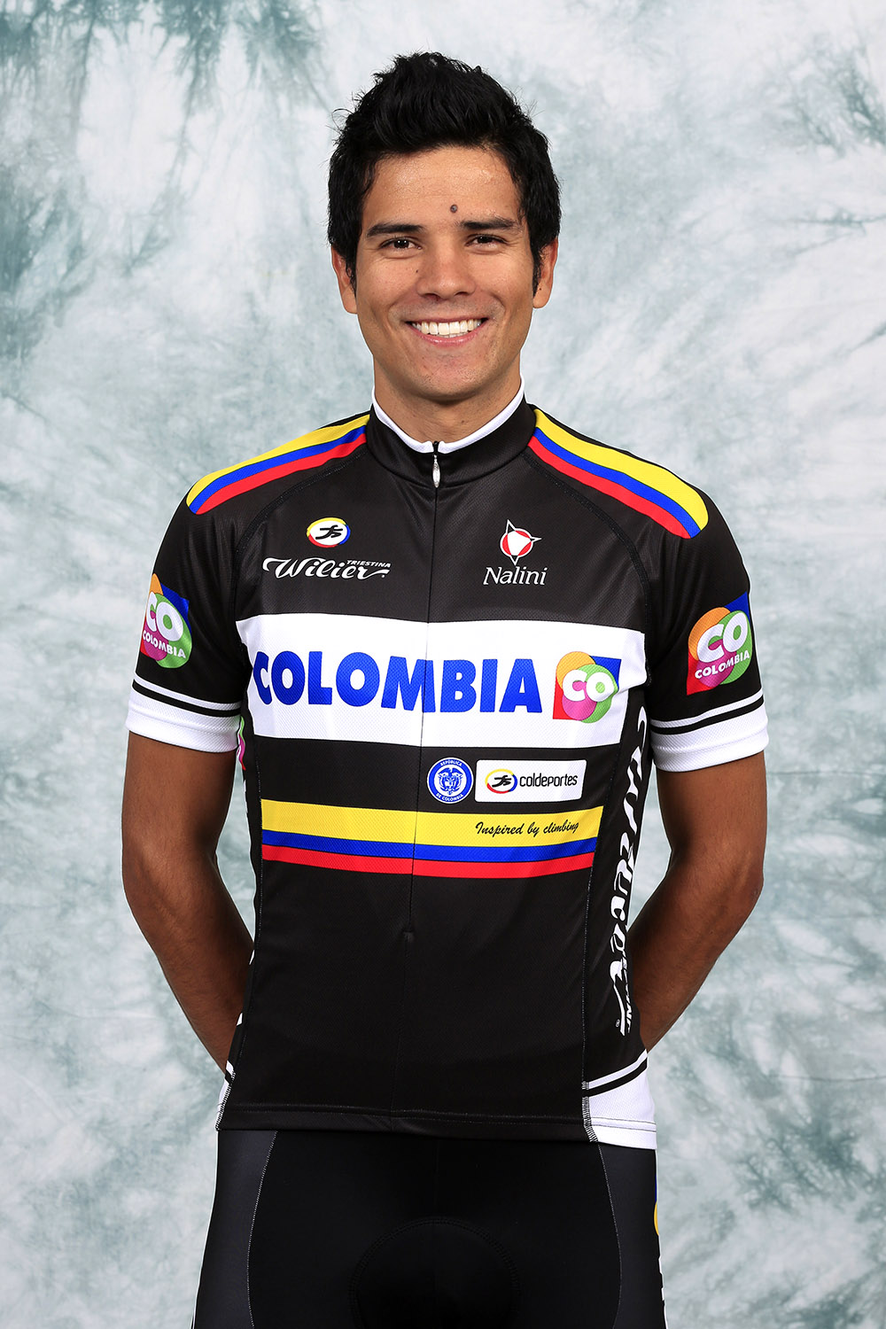 Carlos Quintero en el 2013, con el Team Colombia